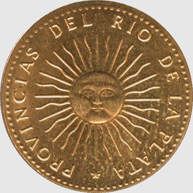 foto de moneda que representa la primera moneda del rio de la plata